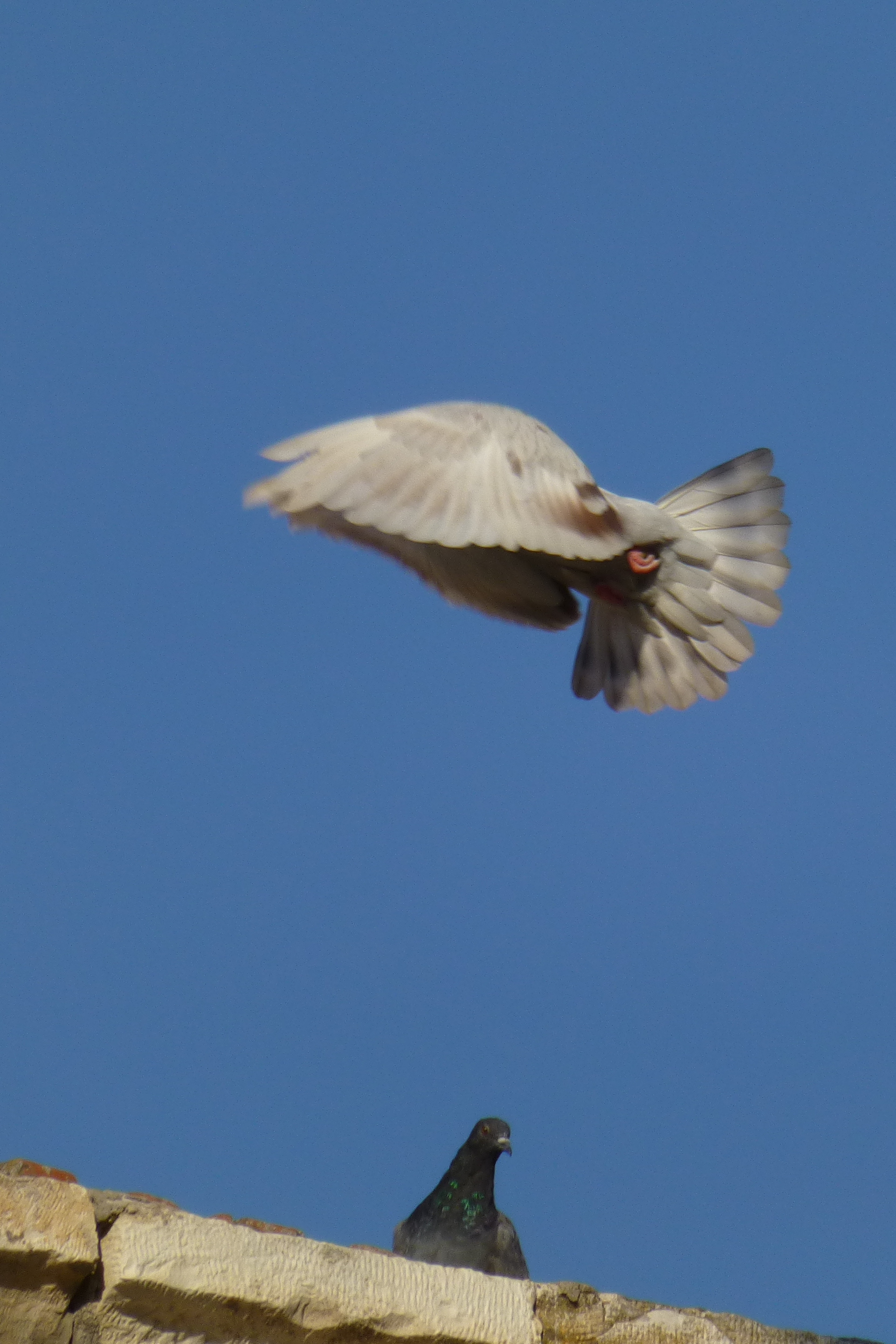 ראשוני המתיישבים באתר היישוב אלוני אבא היו בני הדור השני של תנועת הטמפלרים הגרמנים, אשר הקימו במקום בשנת 1907 מושבה חקלאית קטנה ושמה "ולדהיים".